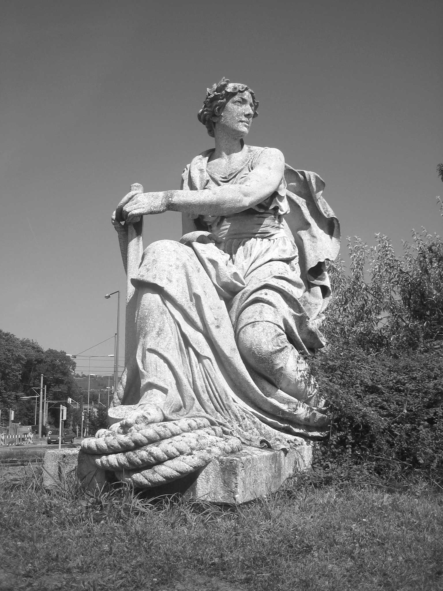 Skulptur "Handel" (1898) von Adolf Fremd